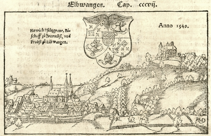 Ellwangen „anno 1549“, aus Sebastian Münsters "Cosmographia"